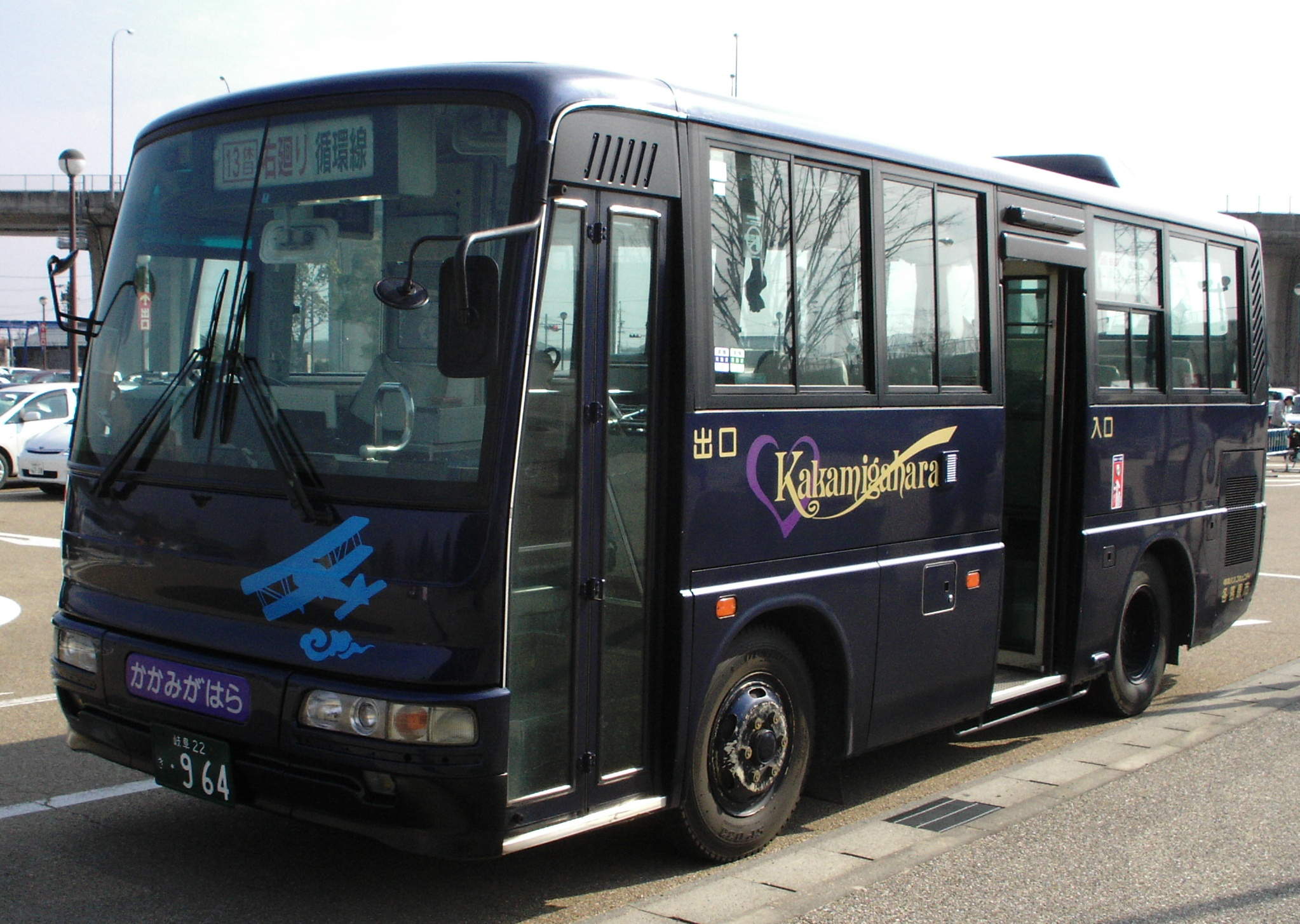 各務原市ふれあいバス